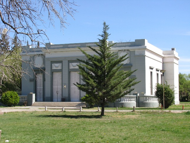 Biblioteca de la Facultad de Educación de la UNCo "Casa Peuser", construida a principios del siglo XX. Cipolletti, Río Negro Province, Argentina.